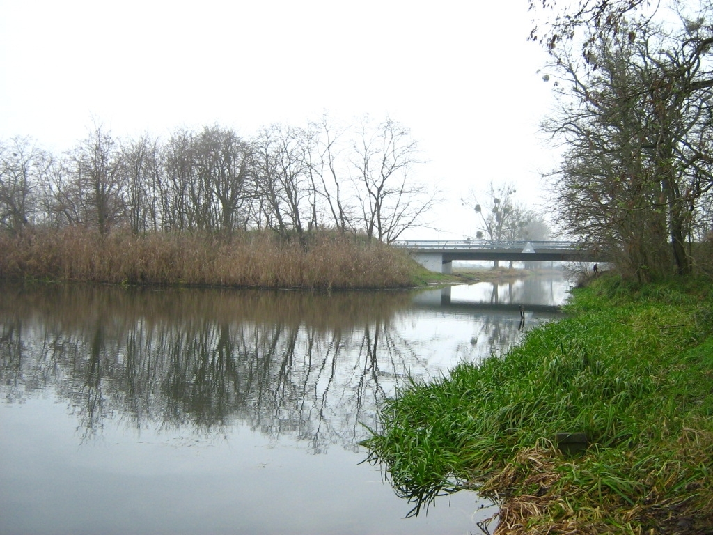 Der Rest des „Hauptschifffahrtskanals Nauen-Paretz“, ein Kanalstück zwischen dem „Havelländischem Großen Hauptkanal“ und dem Havelkanal zwischen Zeestow und Bredow. Schiffbar ist der Nauen-Paretzer Kanal nur zum Havelländischen Großen Hauptkanal. Zum Havelkanal hin versperrt ein Wehr die Durchfahrt. (Landkreis Havelland, Brandenburg) - Google Maps - Google Earth